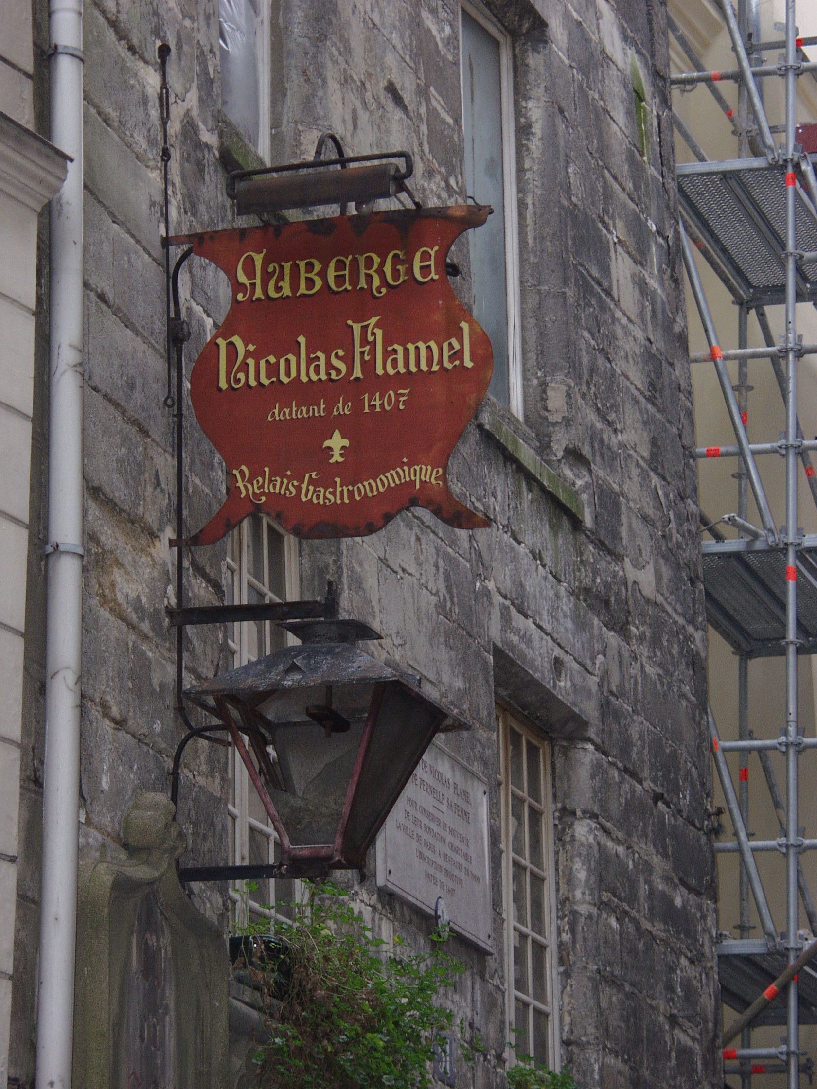 Auberge Nicholas Flamel in Paris